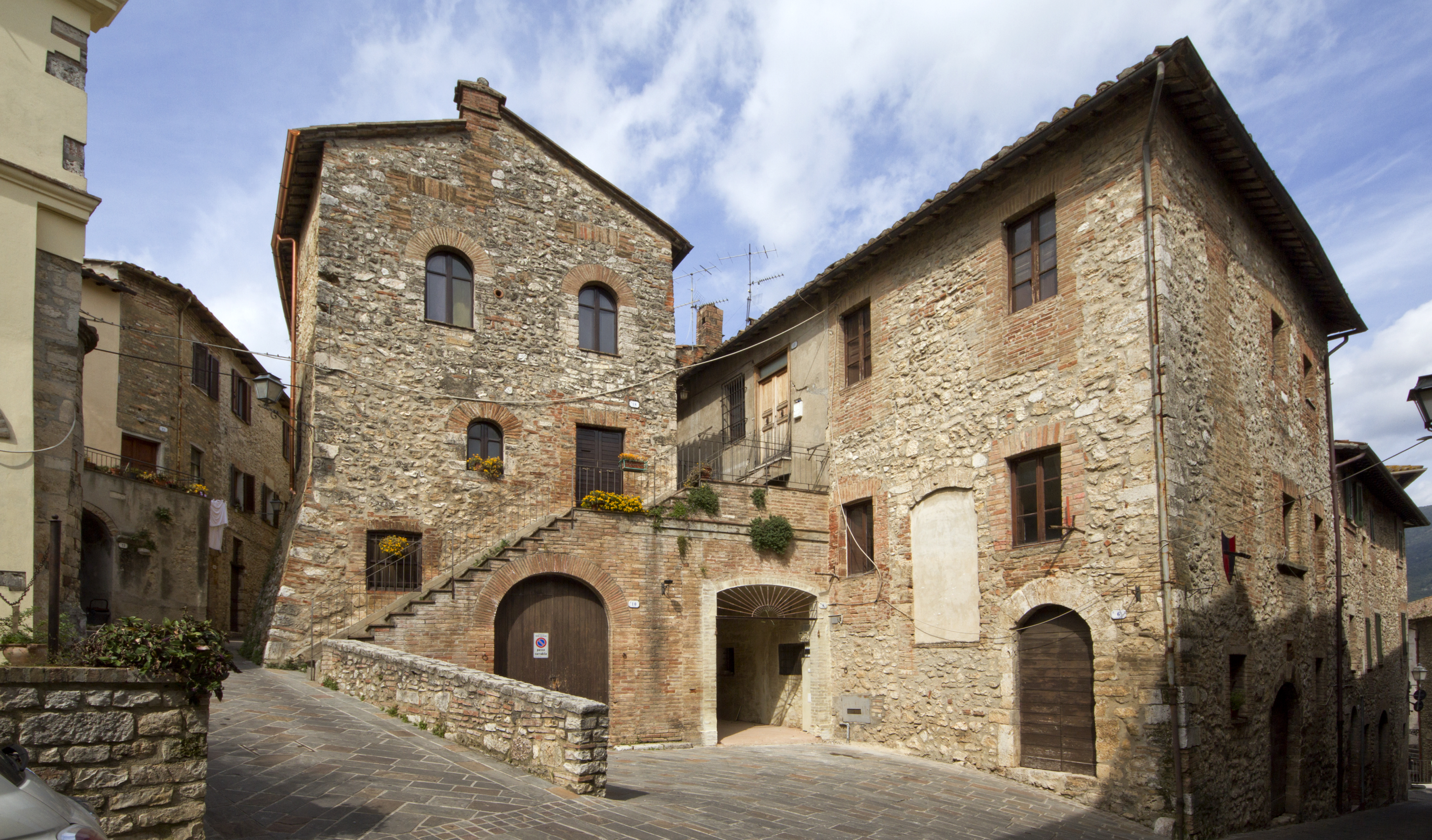 05029 San Gemini TR, Italy